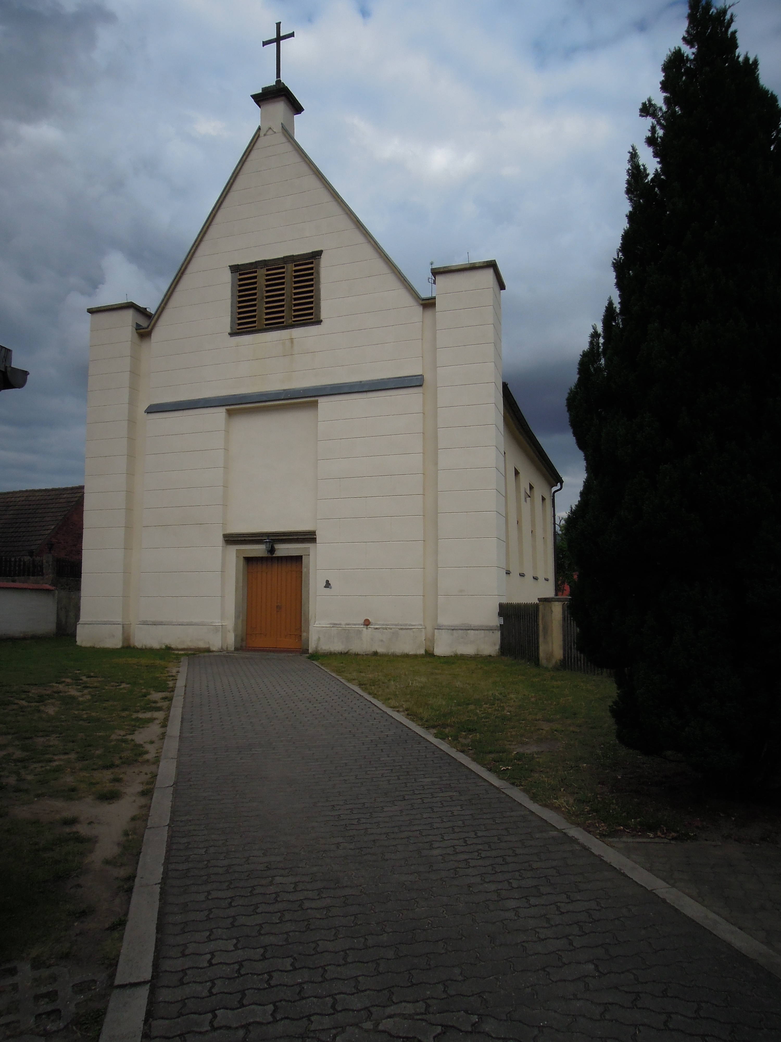 Dorfkirche Kropstädt -Westfassade- im August 2020